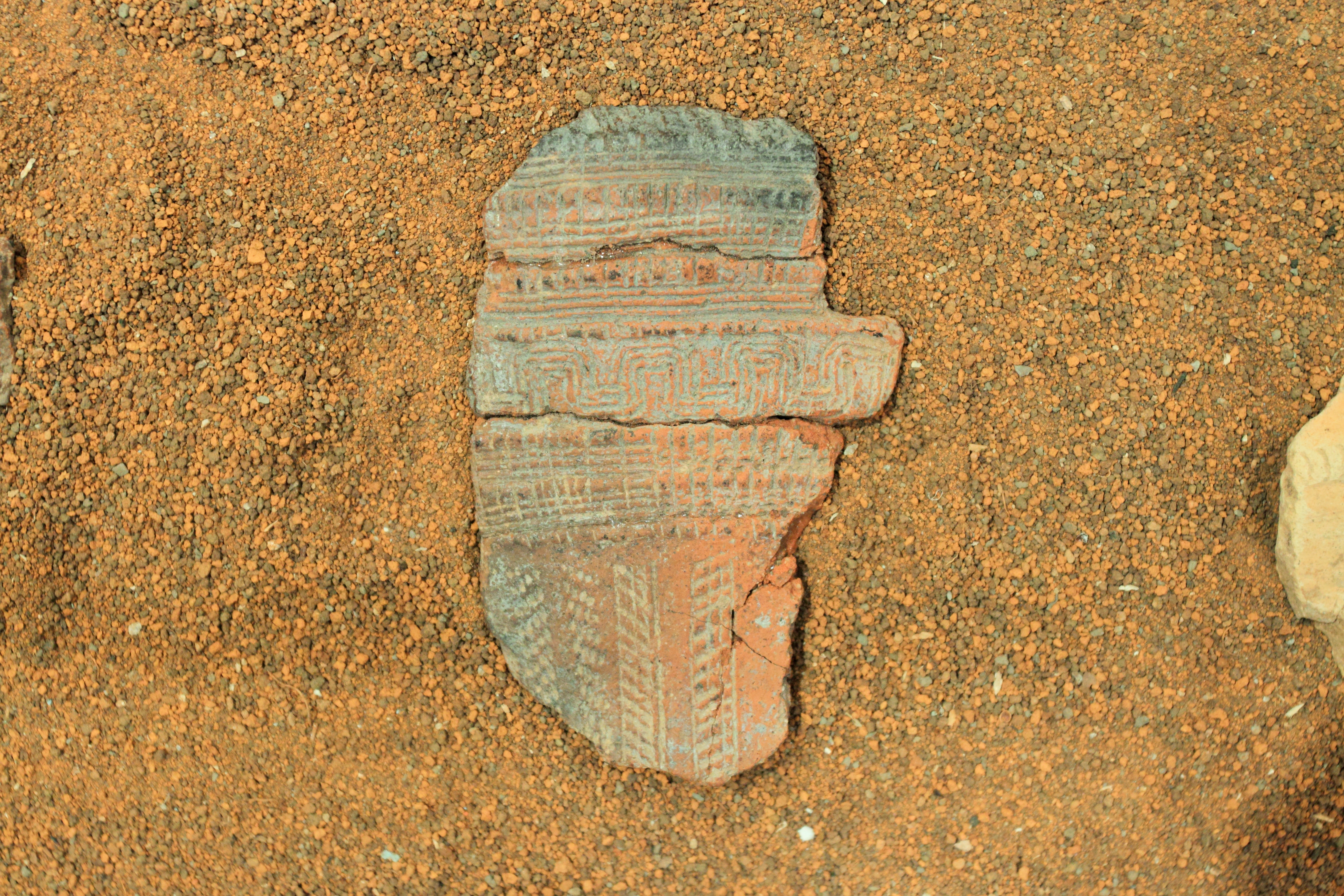 甑皮岩遗址陈列馆藏出土文物——陶器残片